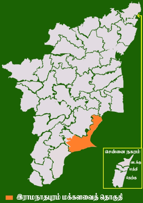 தமிழக வரைபடத்தில் உள்ள இராமநாதபுரம் மக்களவைத் தொகுதி